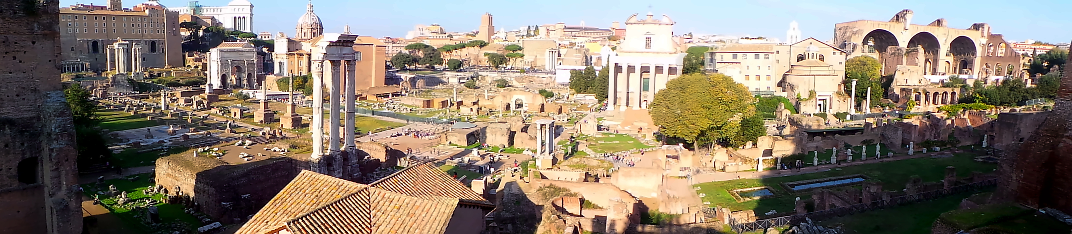 Panoramablick auf das Forum Romanum aus südwestlicher Richtung.